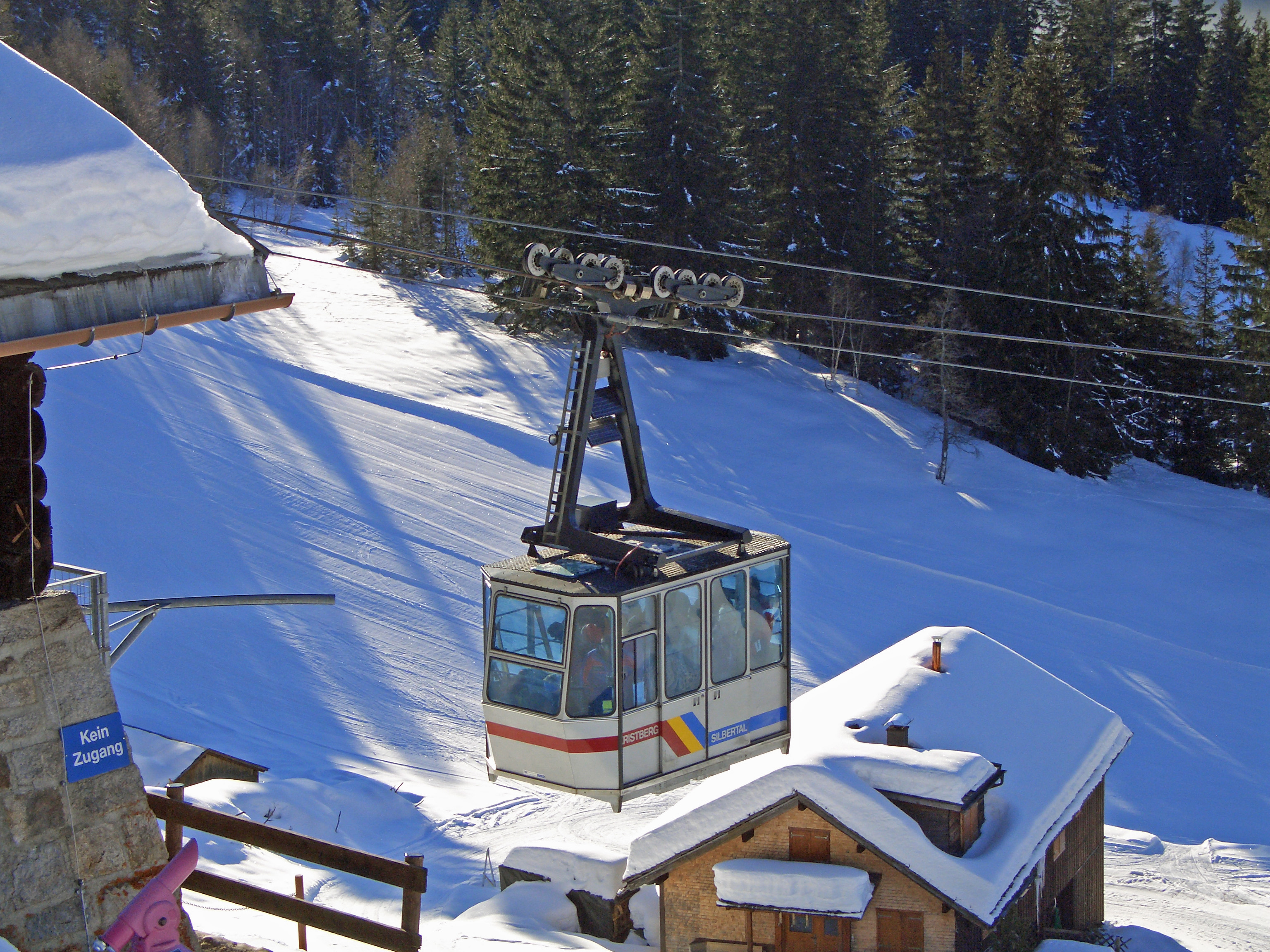 Gondel der Kristbergbahn bei der Einfahrt in die Bergstation